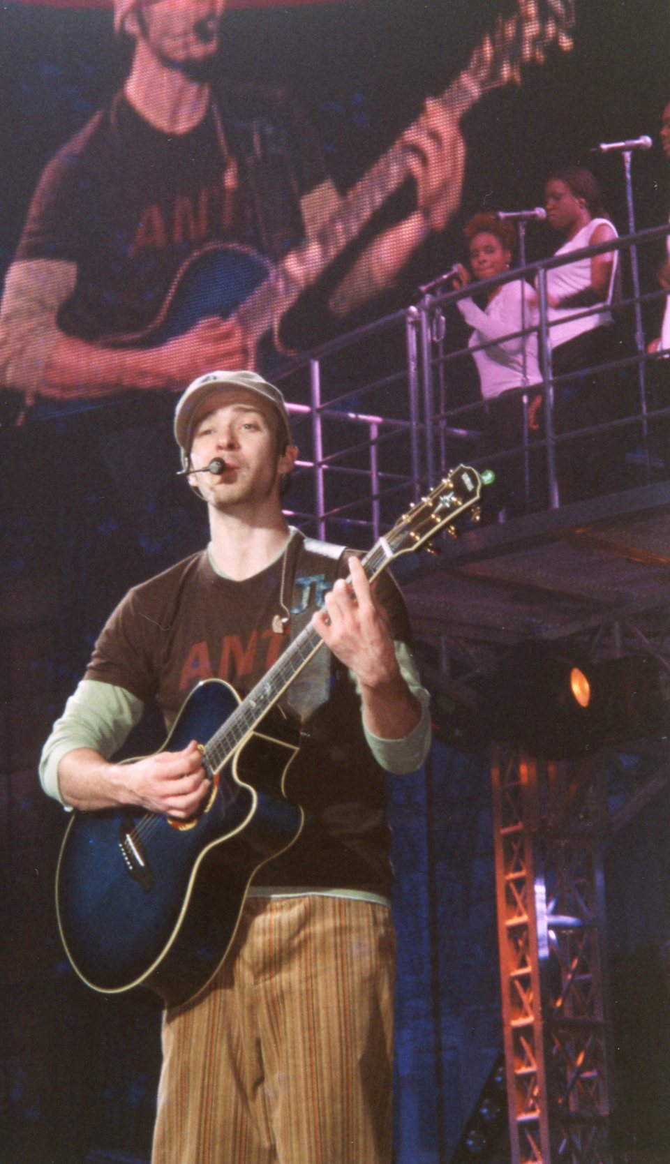 El cantante estadounidense Justin Timberlake dando un show en el Earls Court Exhibition Centre de Londres, Inglaterra, con motivo de su gira musical Justified World Tour en 2003-2004.